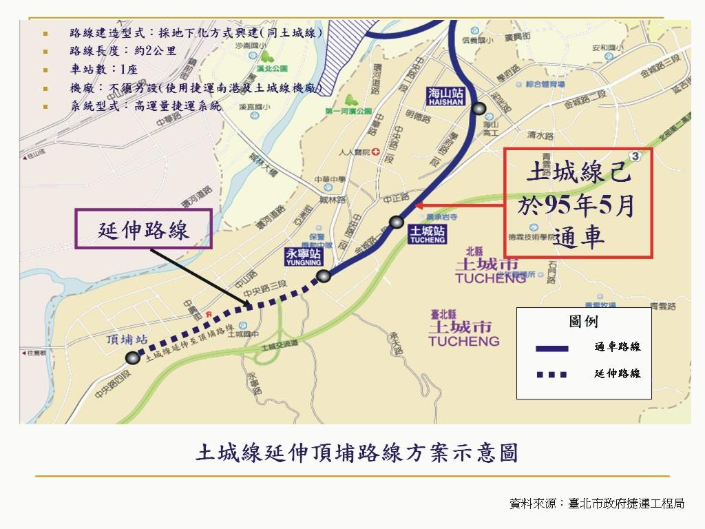 中文（台灣）: 捷運頂埔延伸線示意圖。